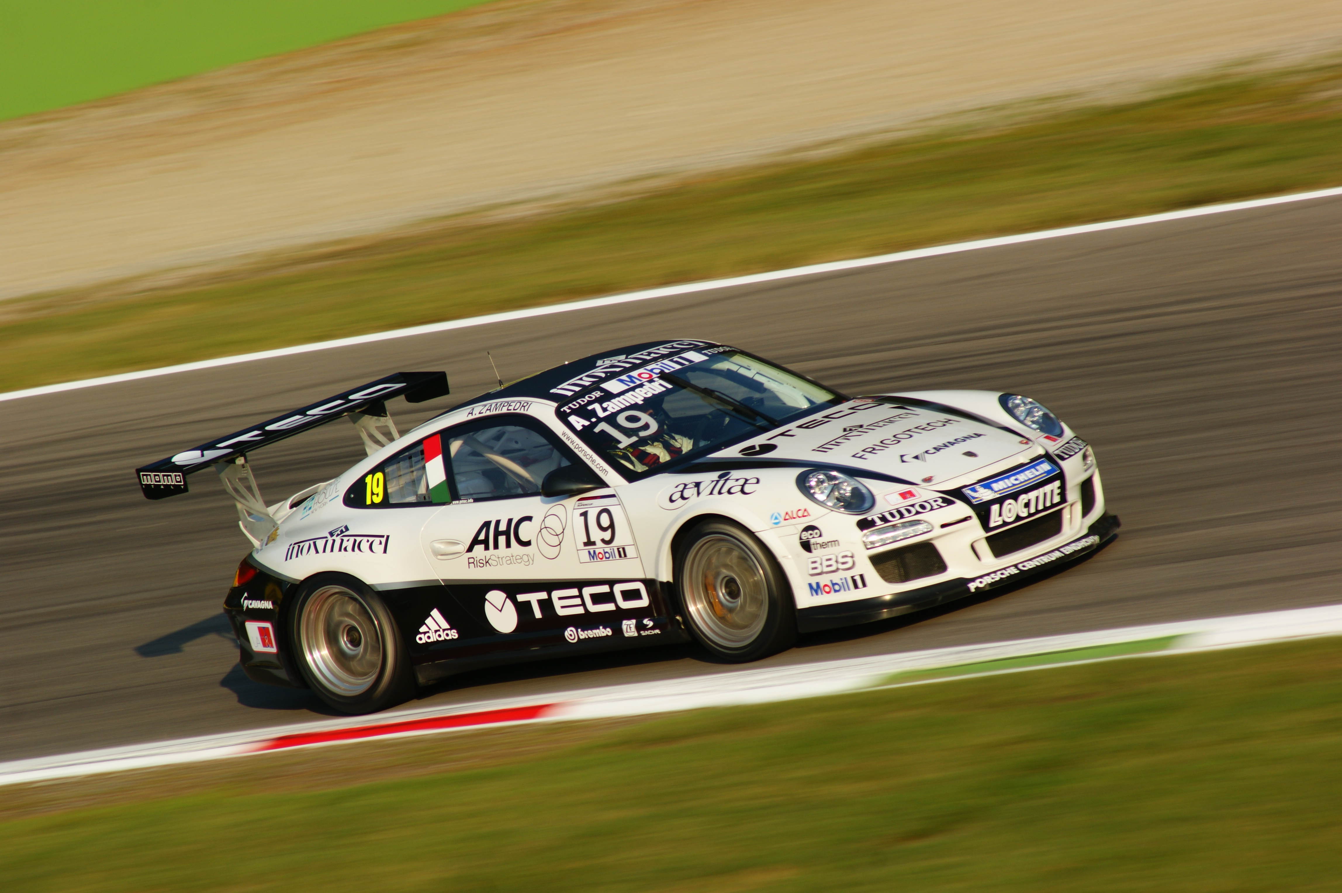 Alessandro Zampedri alla variante Ascari Monza 2011